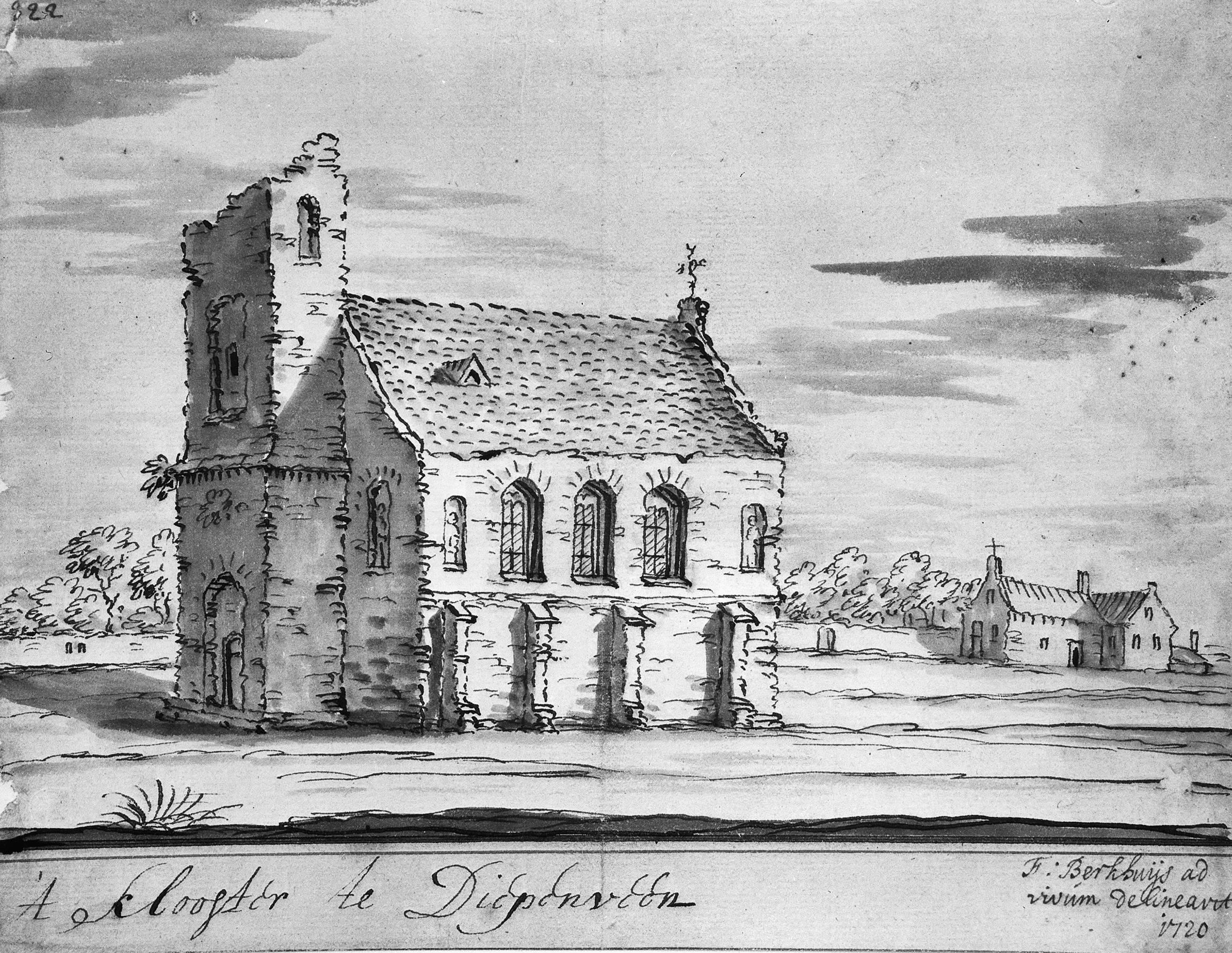 Klooster: 1720 reproductie naar tekening van F.Berkhuys